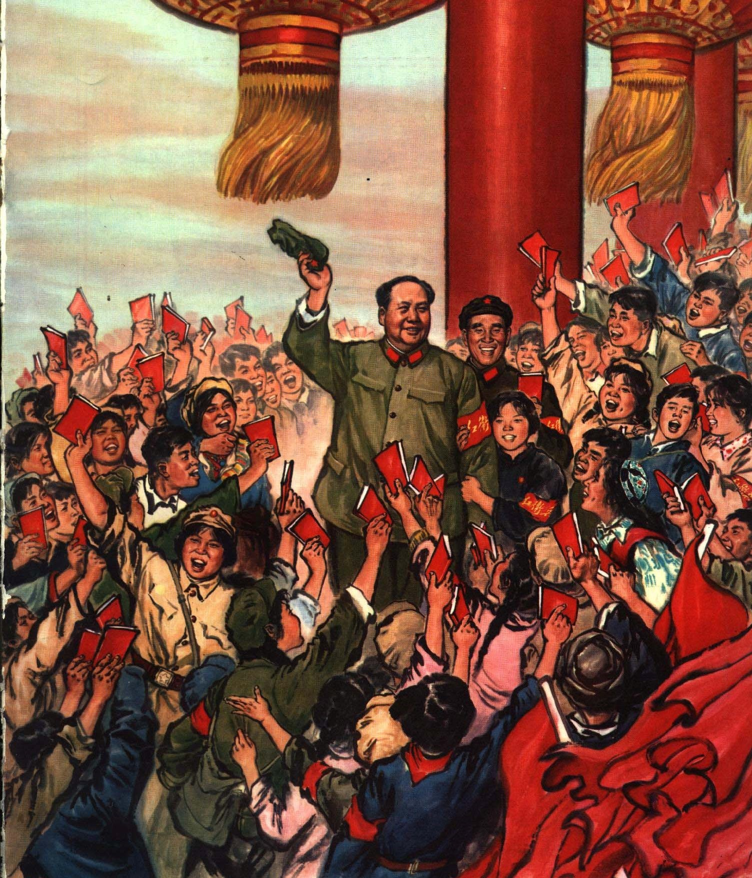 1967-11 1967年 漫画 毛泽东林彪